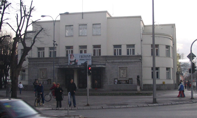 НАРОДНО ПОЗОРИШТЕ РЕПУБЛИКЕ СРПСКЕ